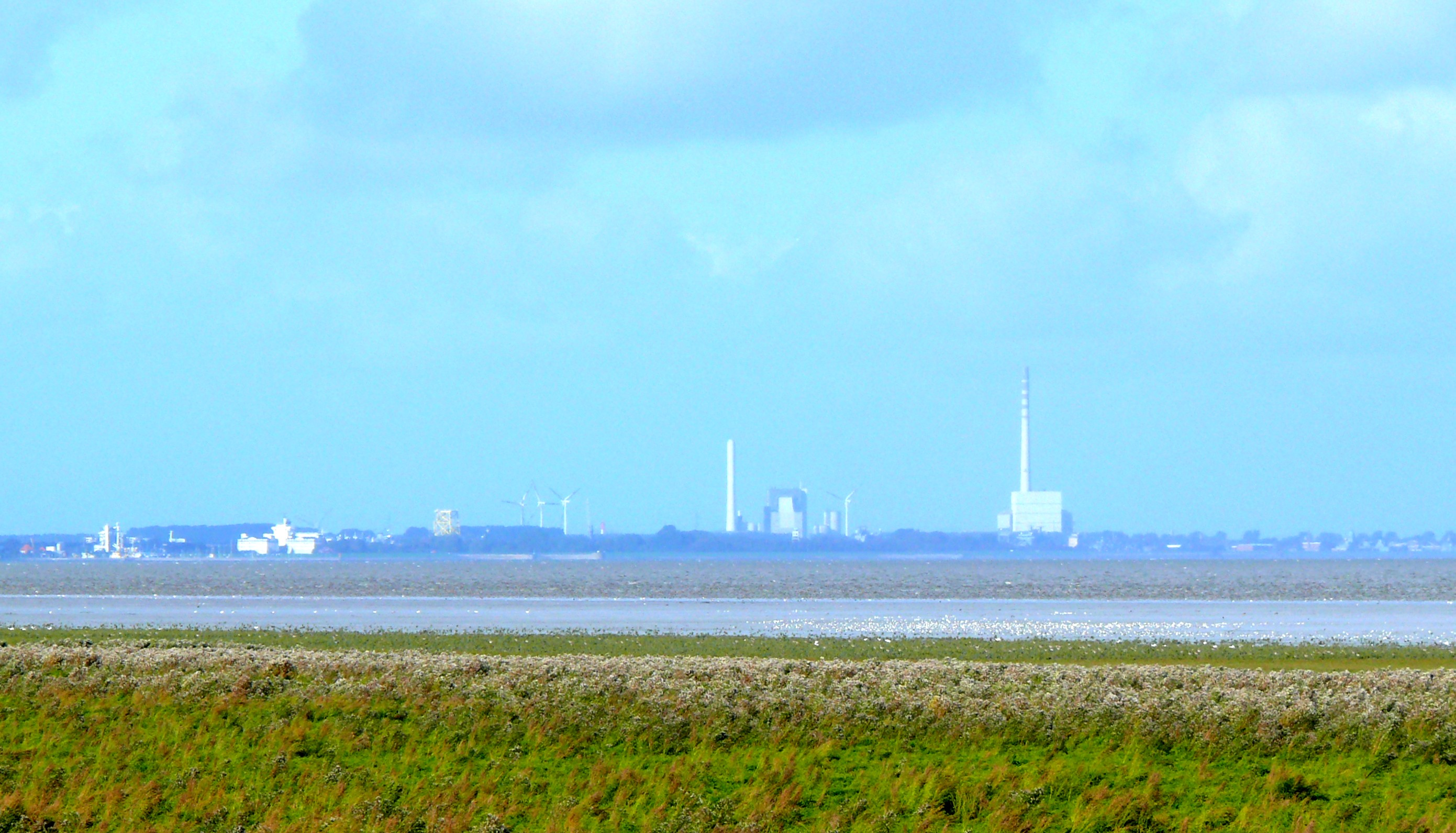 Blick von Varel über den Jadebusen auf Wilhelmshaven